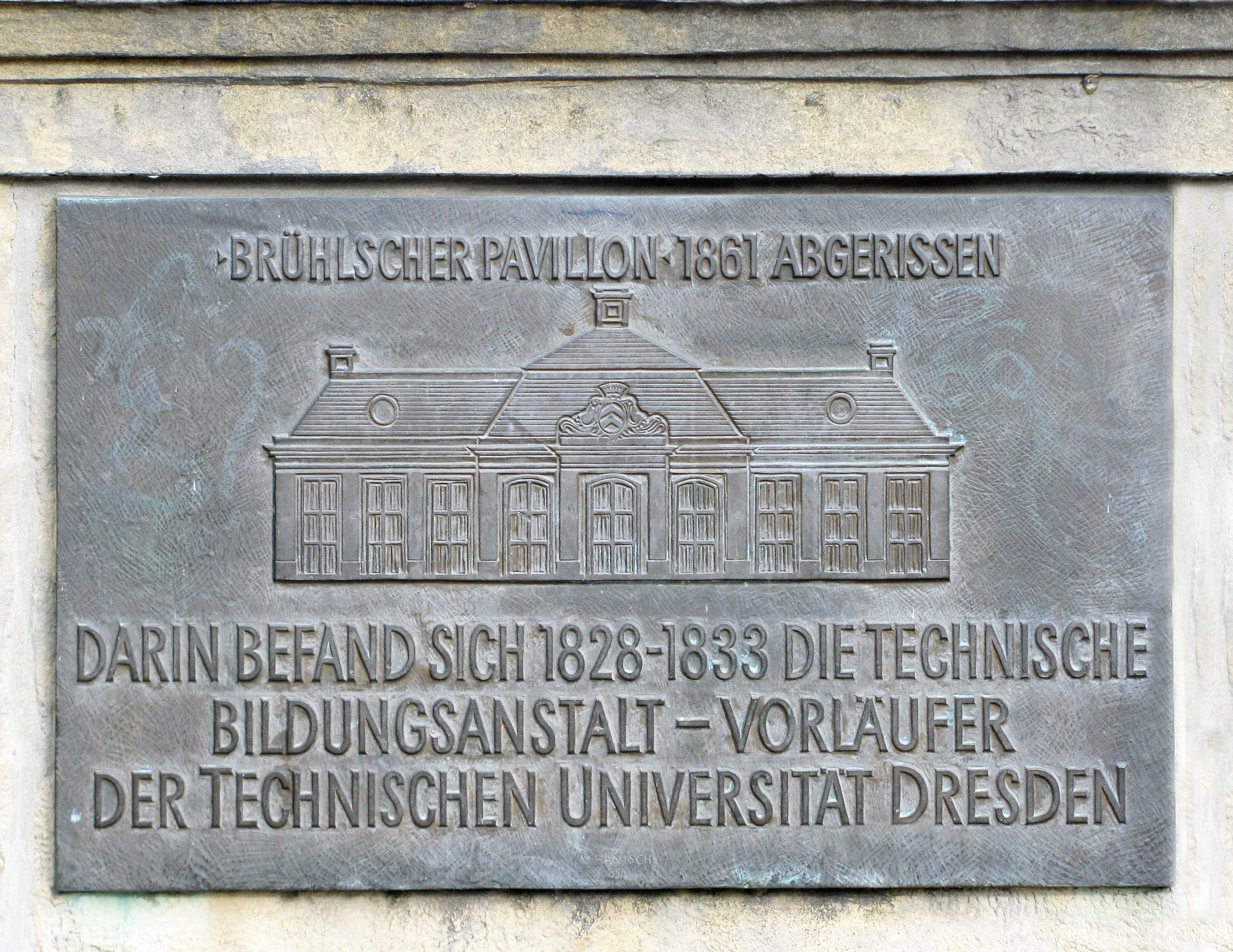 Erinnerungstafel Brühlscher Pavillon